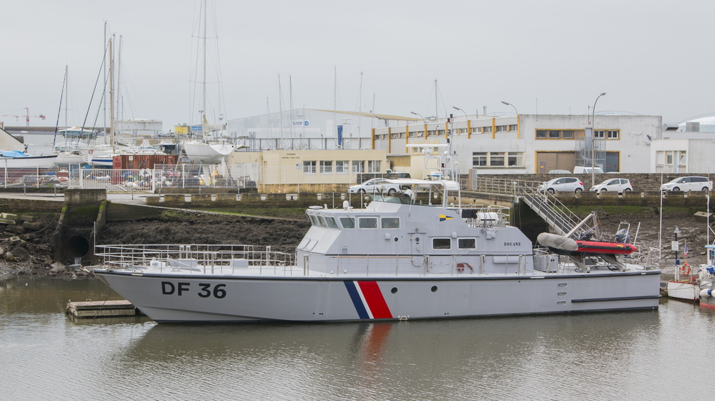 Le Kan Avel, vedette garde-côte des douanes sur le port de Lorient